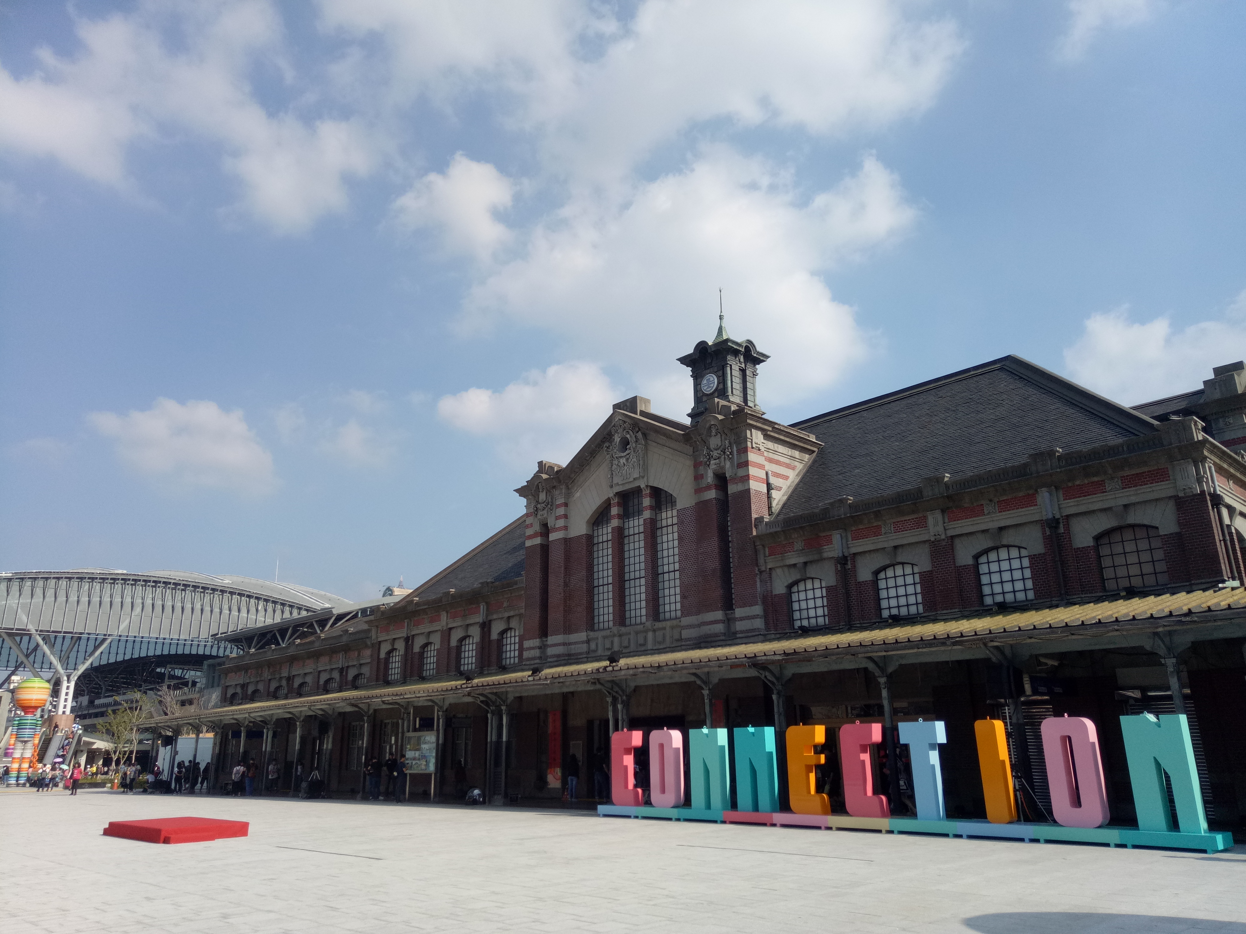 臺鐵臺中車站，新舊站房並列。